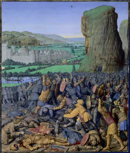 Philistins emportant l'Arche d'Alliance. Bataille de Gelboé Flavius Josèphe, Les Antiquités judaïques, enluminure de Jean Fouquet, vers 1470-1475 Paris, BnF, département des Manuscrits, Français 247, fol. 110v (Livre VI). Philistins emportant l'Arche d'Alliance (en arrière-plan) : Les Philistins emportent l'Arche d'Alliance dans la ville d'Ashdod afin de la déposer dans le temple de Dagôn, leur dieu. Bataille de Gelboé : Les Philistins sont victorieux des Hébreux à la bataille de Gelboé. Saül, épuisé et blessé, mais soucieux de ne pas tomber vivant aux mains de l'ennemi, prie un jeune Amalécite de le tuer. Ce dernier emporte la couronne du roi.